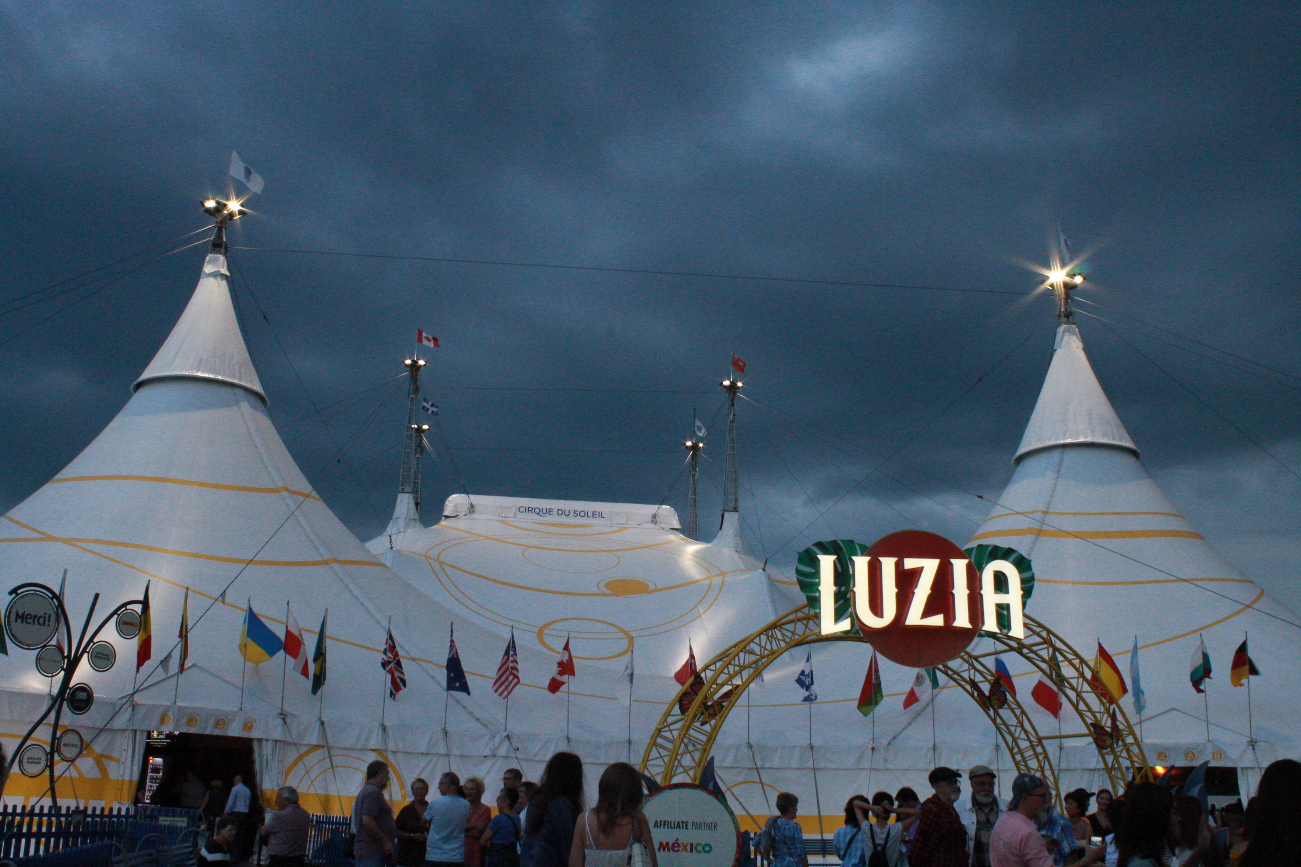 September 2016